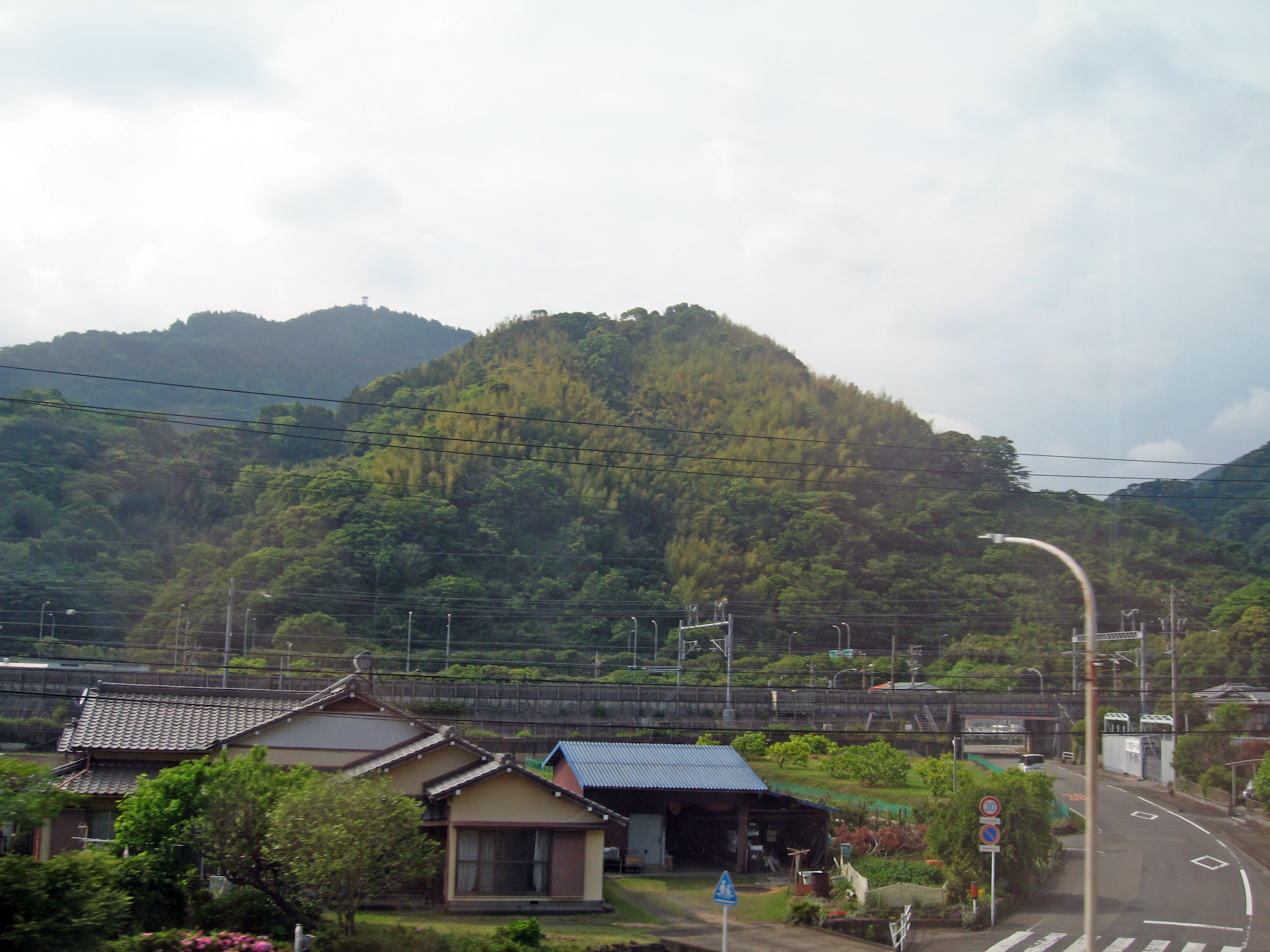 JR東海道線車内よりみた花沢城跡